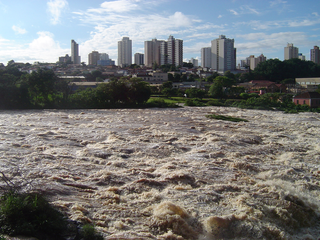 Rio Piracicaba e a cidade de mesmo nomePiracicaba e o rio